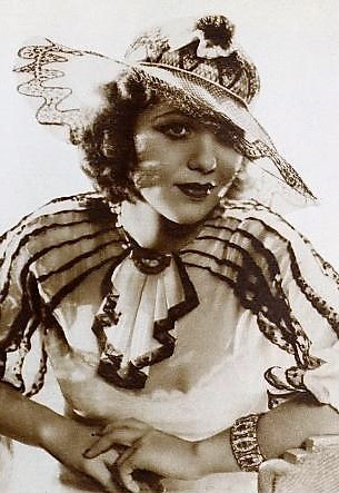 June Brewster